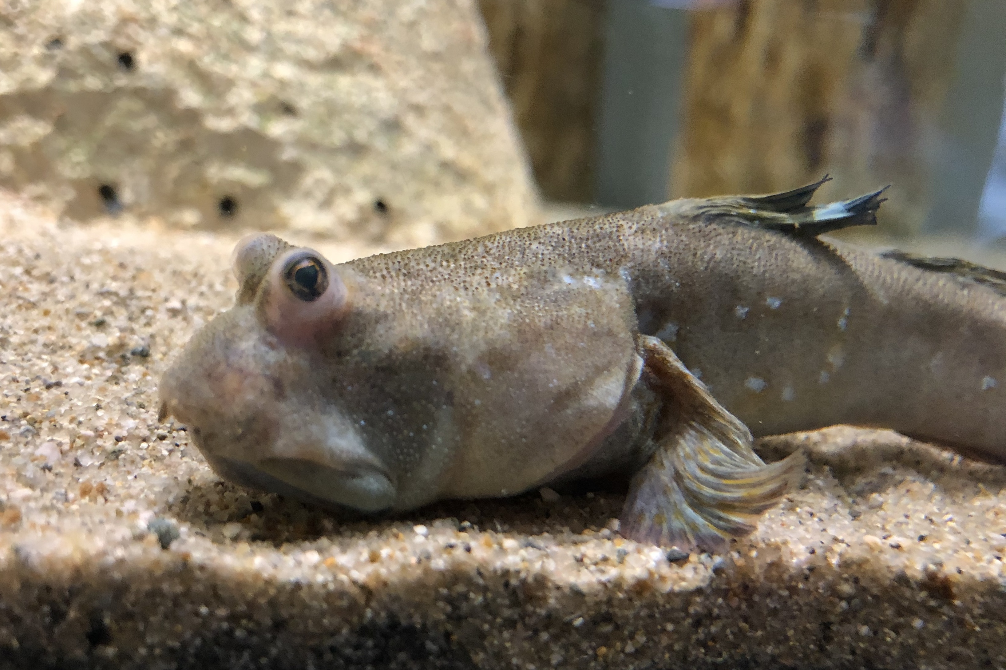 ムツゴロウの頭部。島根県立しまね海洋館飼育個体。